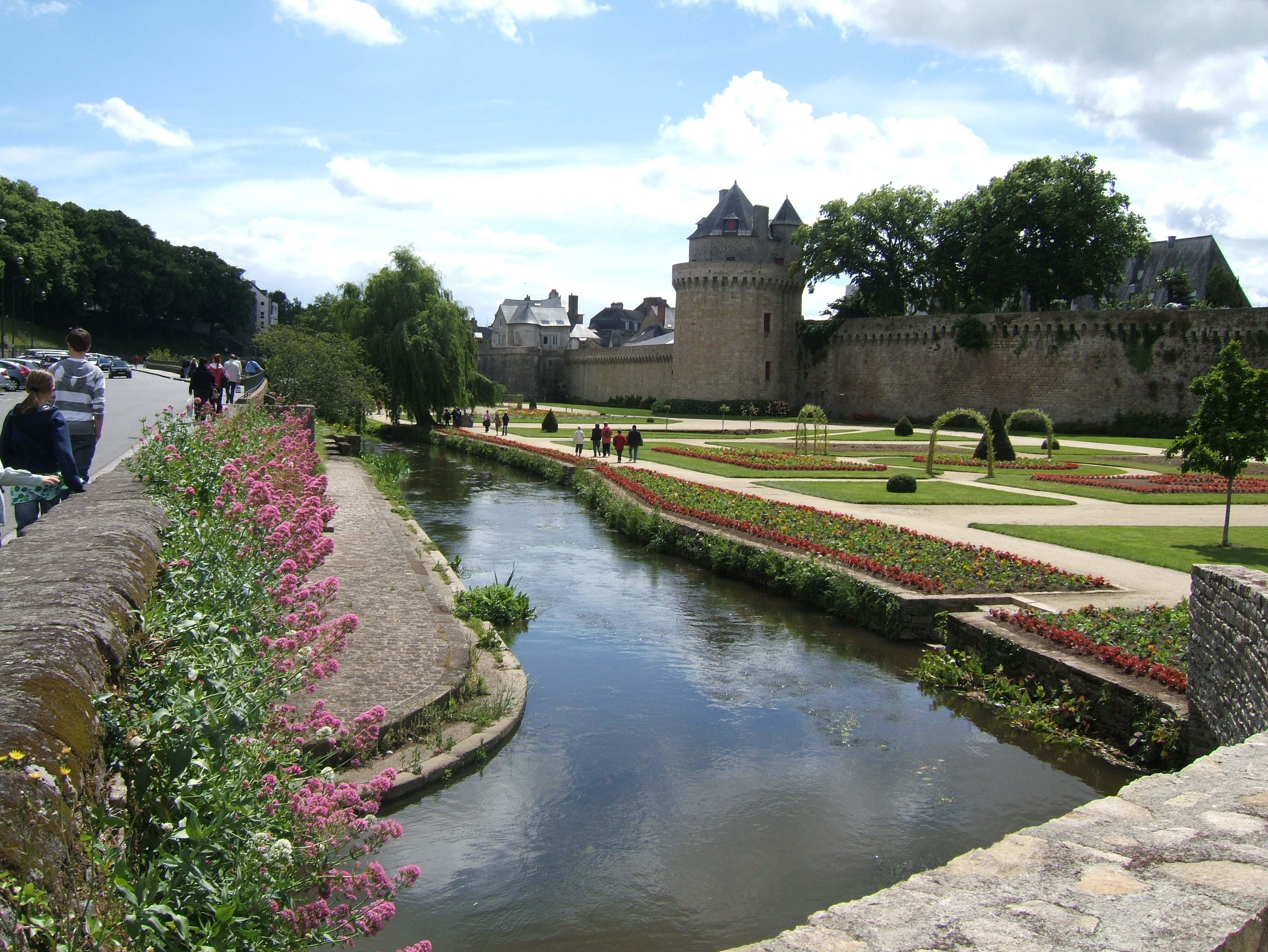 Vue sur les remparts de Vannes avec au premier plan la Marle